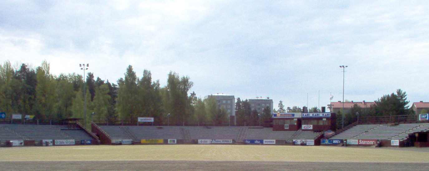 Hippoksen pesäpallostadion